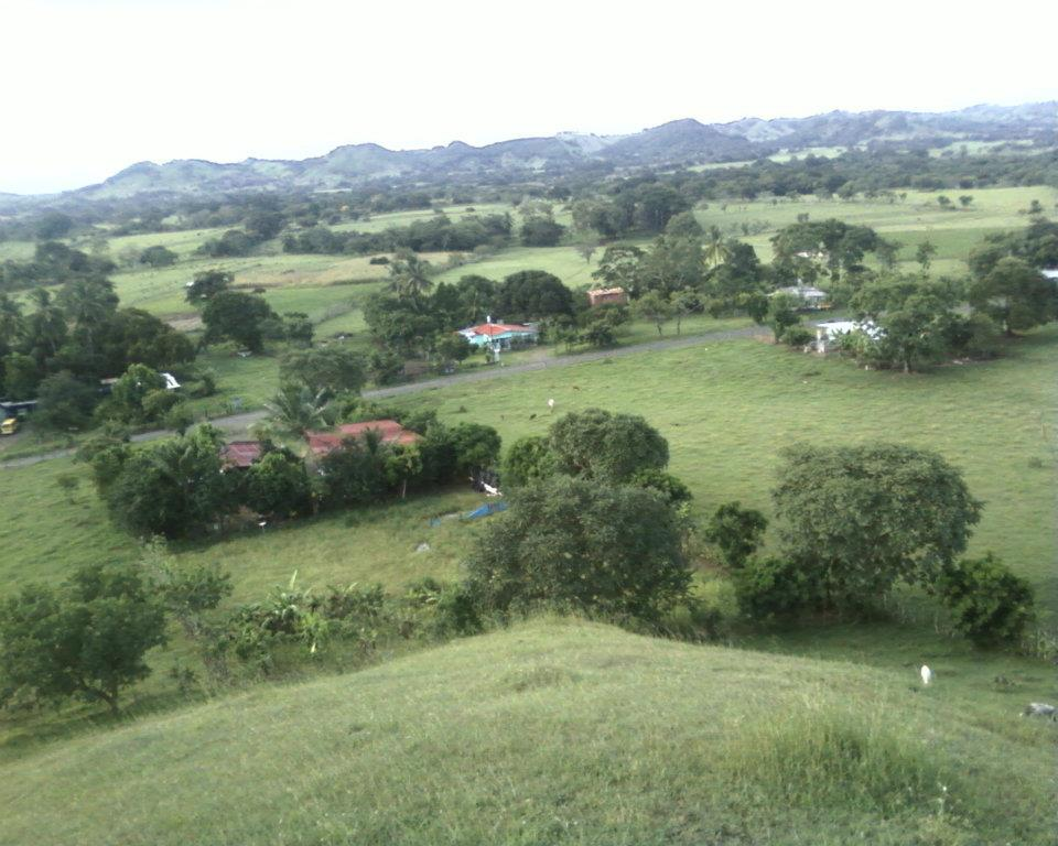 vista desde el cerro de la teta